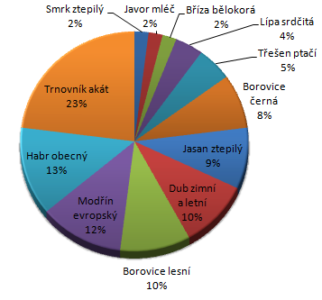 Graf zastoupení lesního porostu v Dolní Šárce